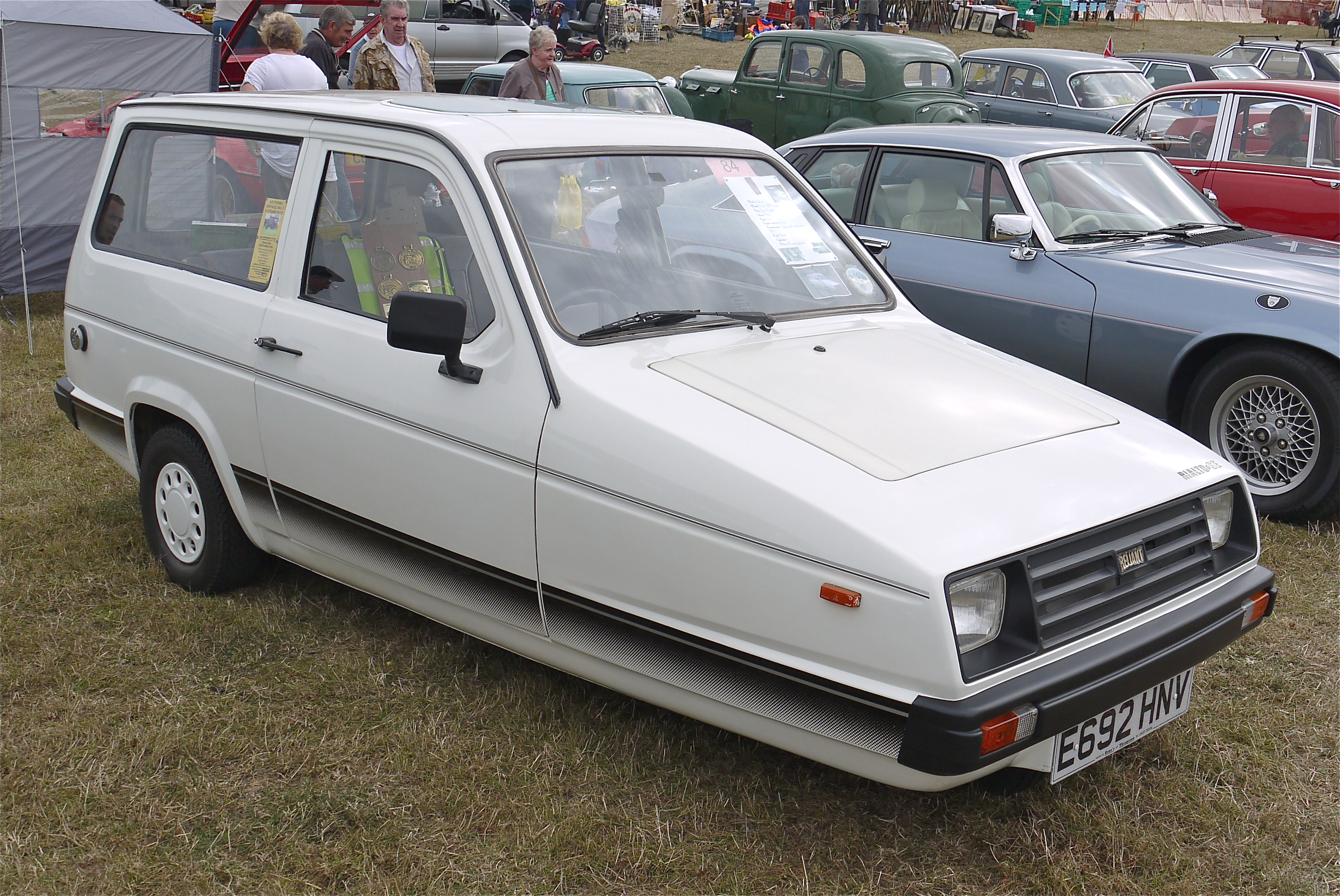 Panasonic G1